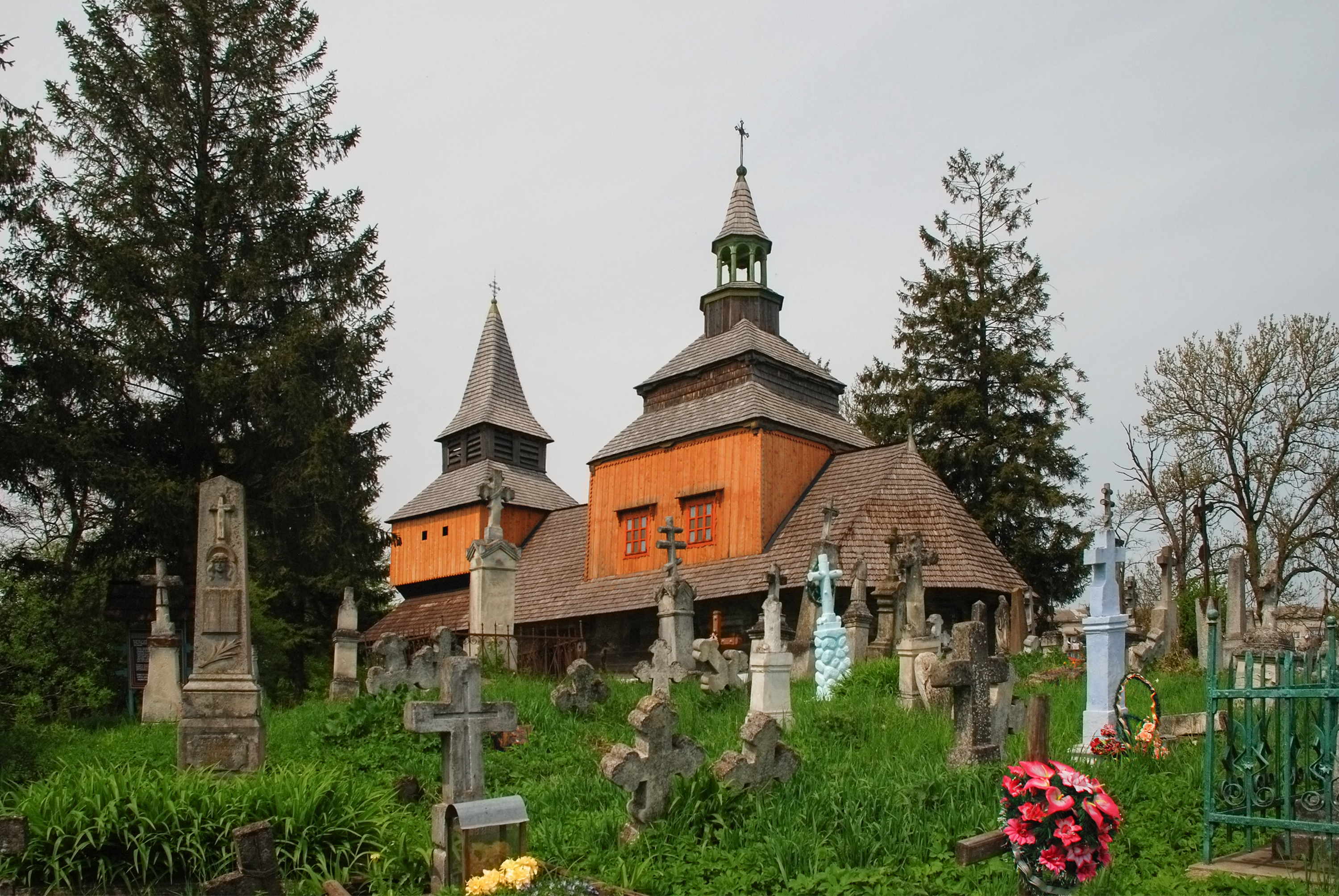 Святодухівська церква (дер.), Рогатин, вул. Роксолани, 10